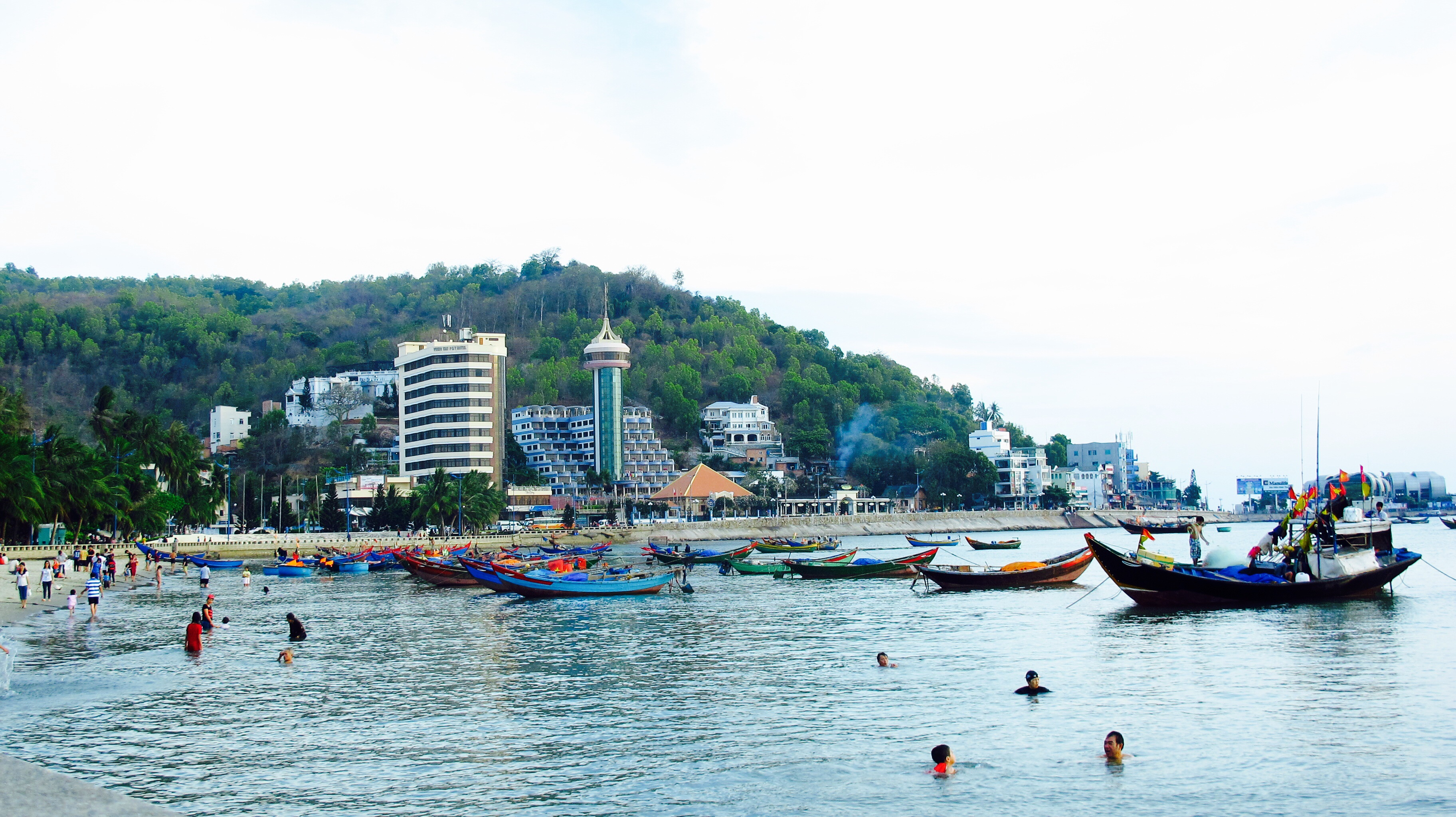 Bai truoc , Phuong 1, tp Vungtau, Vietnam